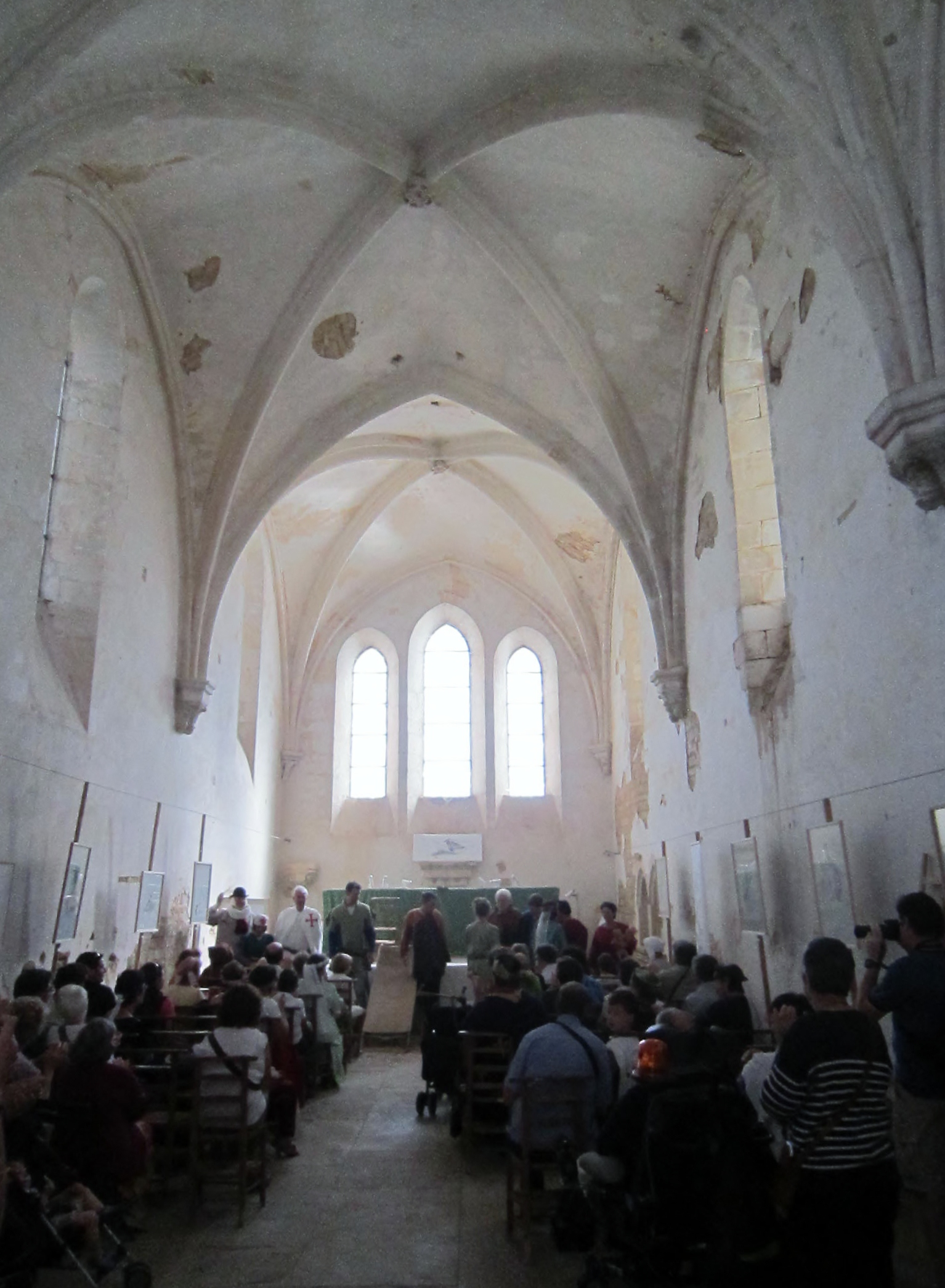 Commanderie d'Avalleur, intérieur de l'église templière